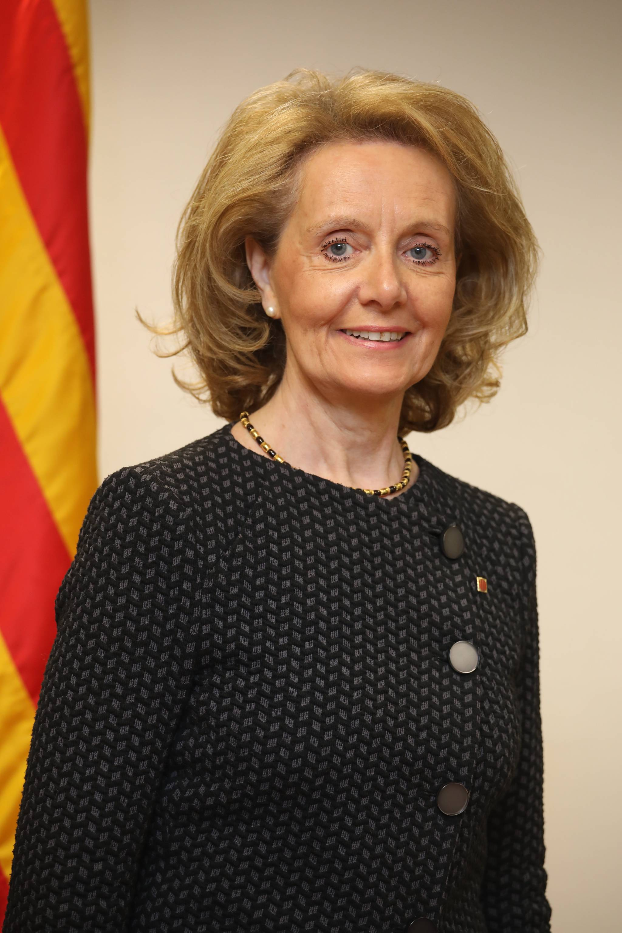 Fotografia de la consellera Mariàngela Vilallonga